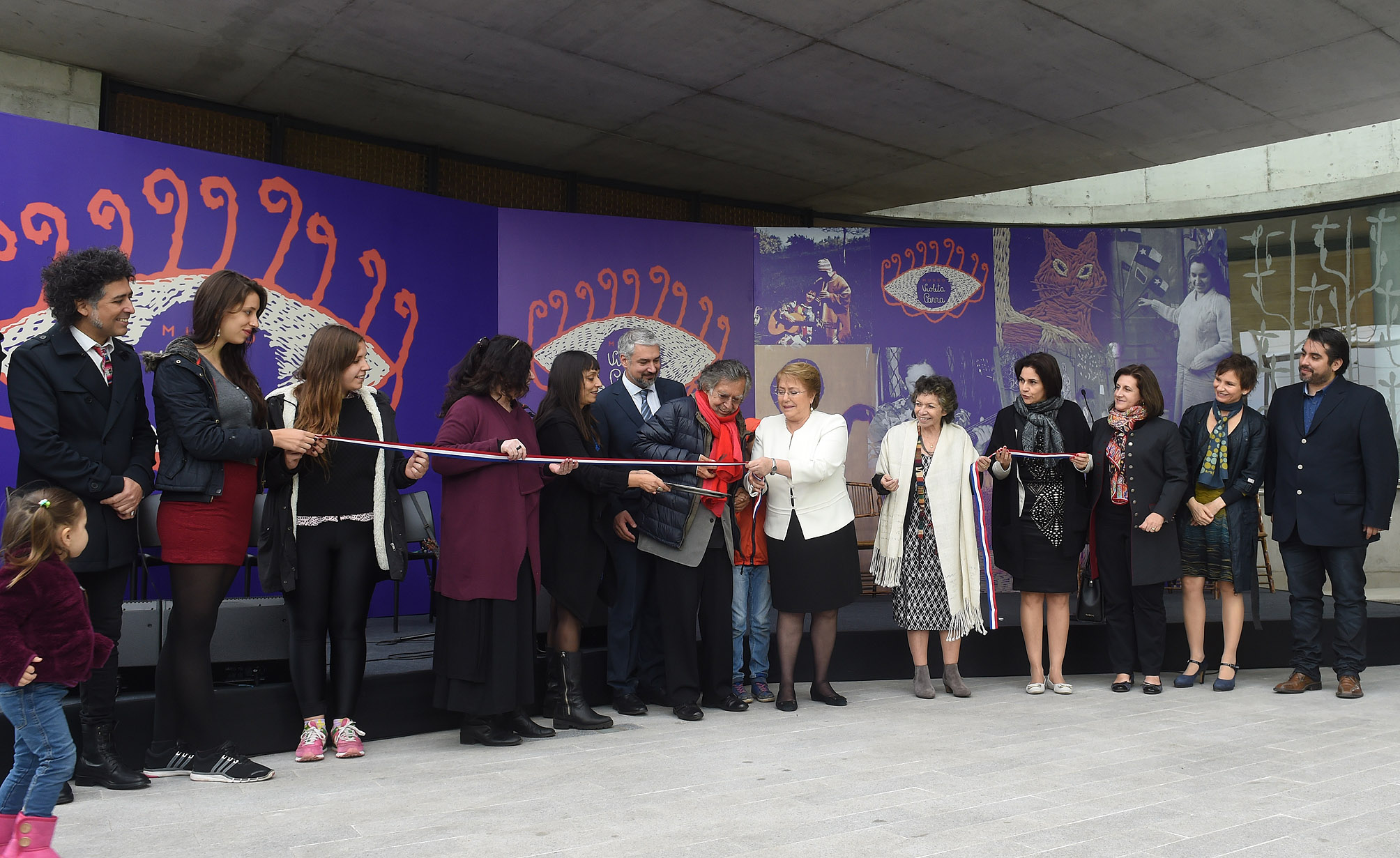 Inauguración del Museo Violeta Parra: Ángel Parra, cantante e hijo de Violeta, corta la cinta que sostiene la entonces presidenta Michelle Bachelet. Detrás de ambos, Ernesto Ottone, ministro de Cultura; a la derecha de Bachelet, Isabel Parra, cantante al igual que su hermano Ángel.